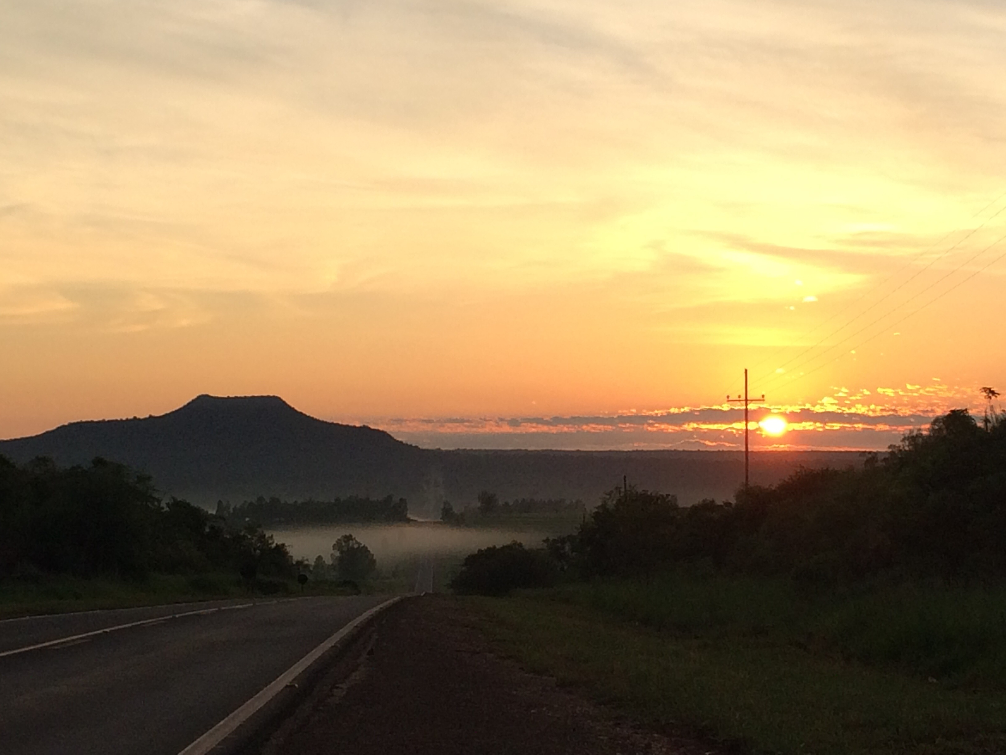 Sol nascendo no Pontal do Paranapanema sob as vistas do Parque Estadual Morro do Diabo - Teodoro Sampaio/SP - foto própria